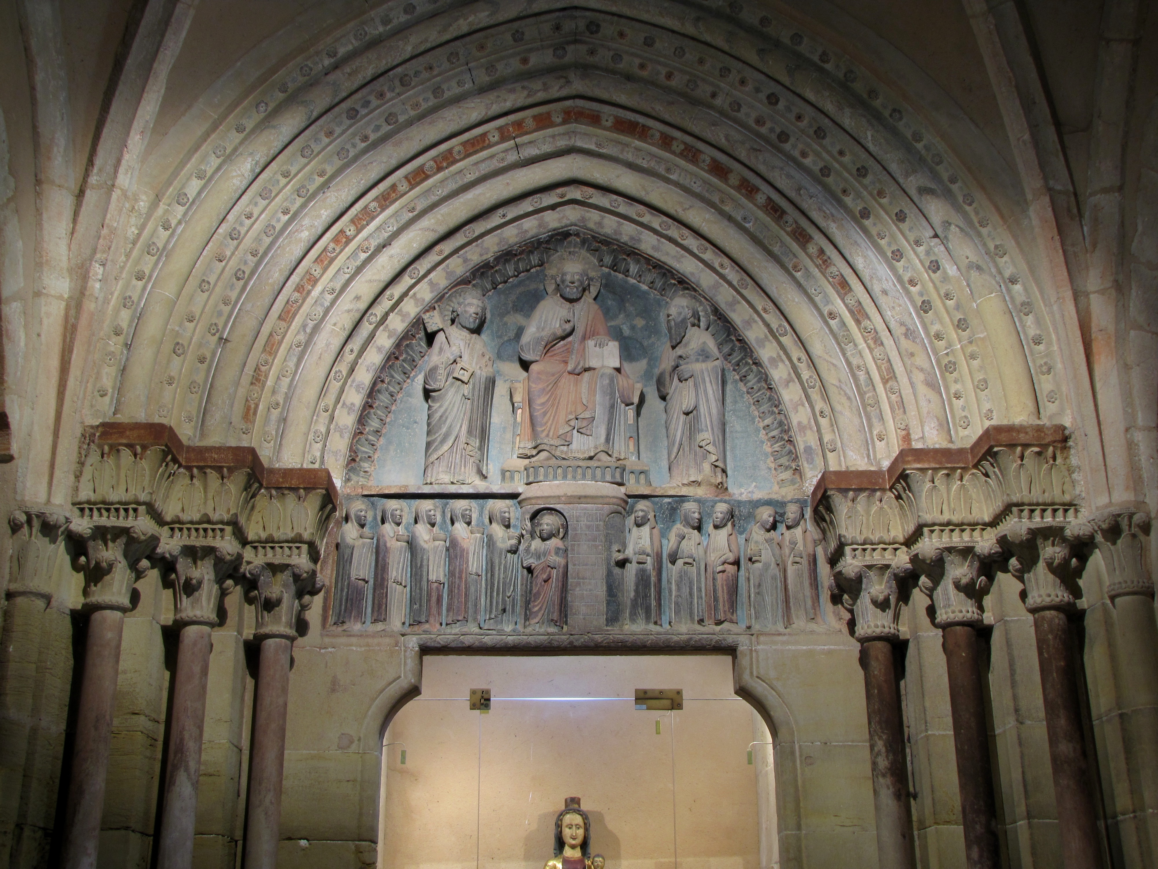 Alsace, Haut-Rhin, Église Saints-Pierre-et-Paul (XIIIe-XIXe) d'Eguisheim (PA00085415, IA68000505).Tympan "Le Christ entre saint Pierre et saint Paul" et Vierges sages et vierges folles (XIIIe)